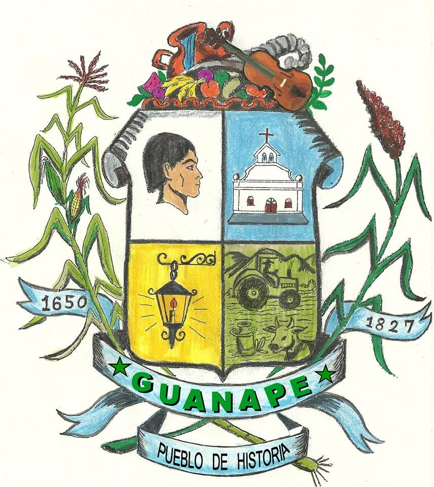 Escudo de la parroquia Guanape Venezuela